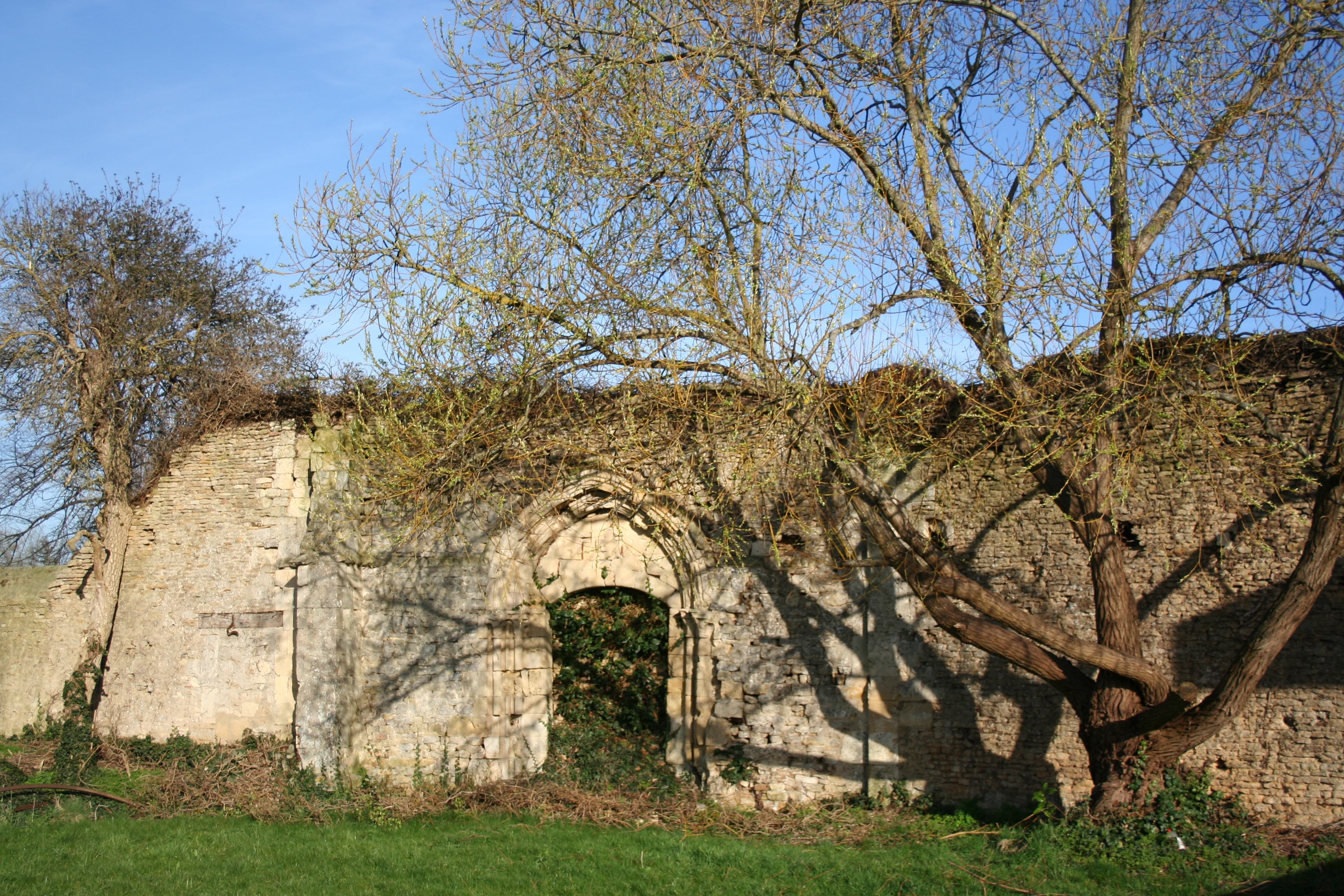 Vestiges du portail de la chapelle Saint-Vincent à Hérouville-Saint-Clair (Calvados, France), inscrits au titre des monuments historiques depuis le 29 octobre 2004